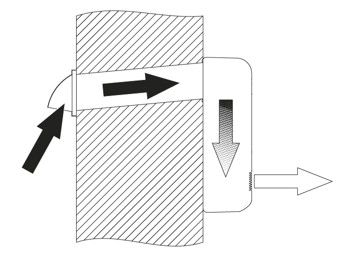 Забор воздуха с улицы происходит через технологическое отверстие в стене